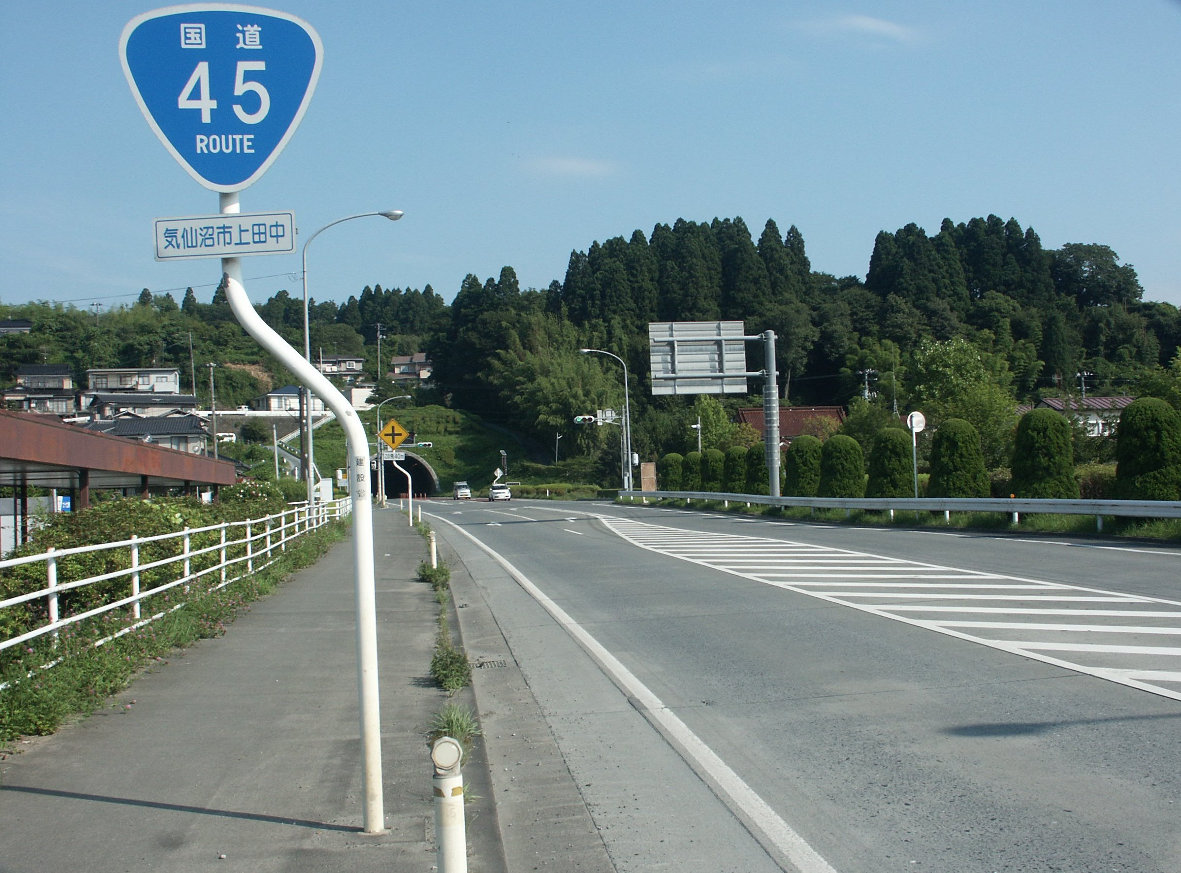 国道45号線気仙沼バイパス 宮城県気仙沼市上田中付近（陸前高田市方面を撮影）